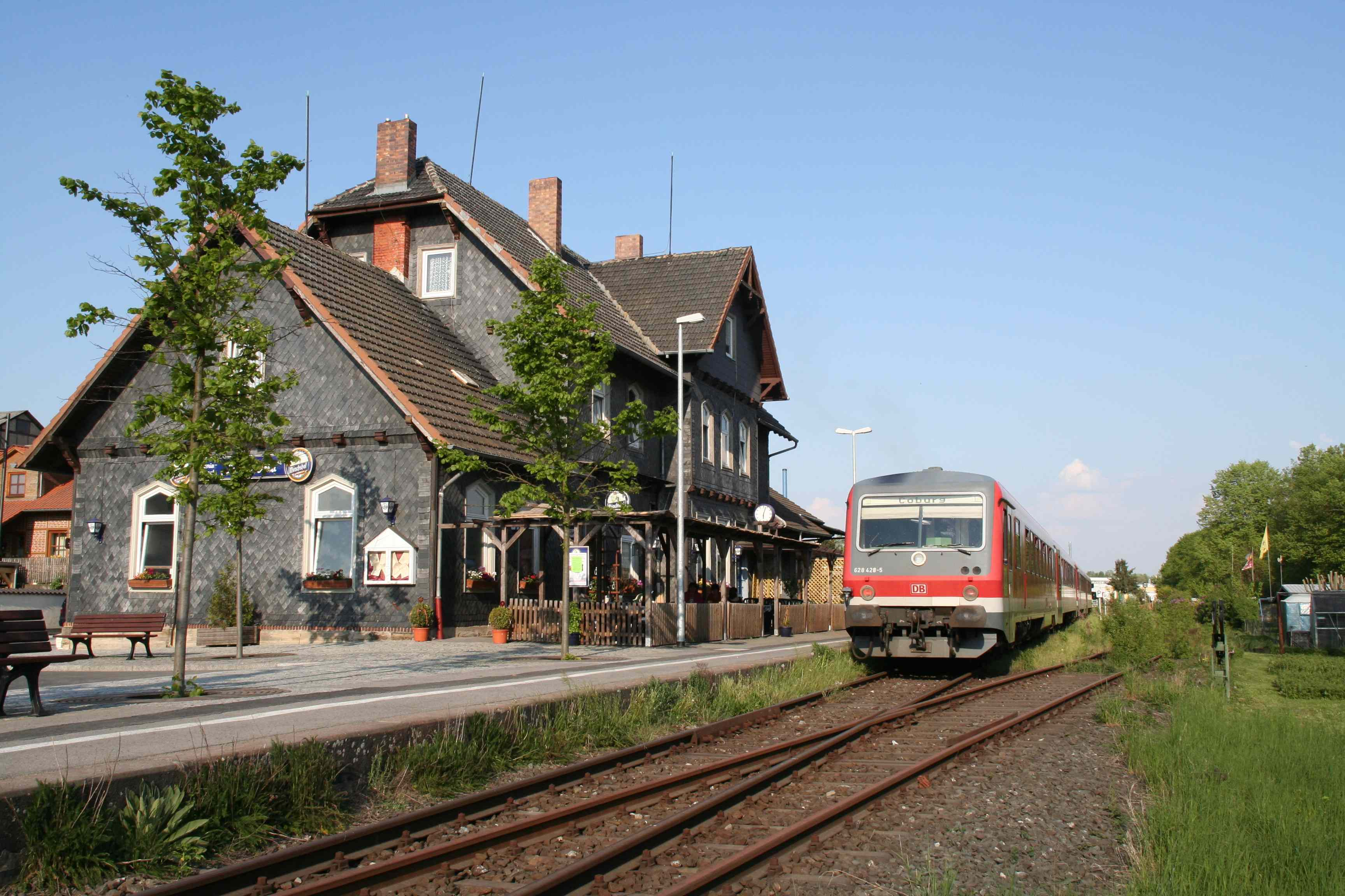 Bahnhof Bad Rodach im Landkreis Coburg